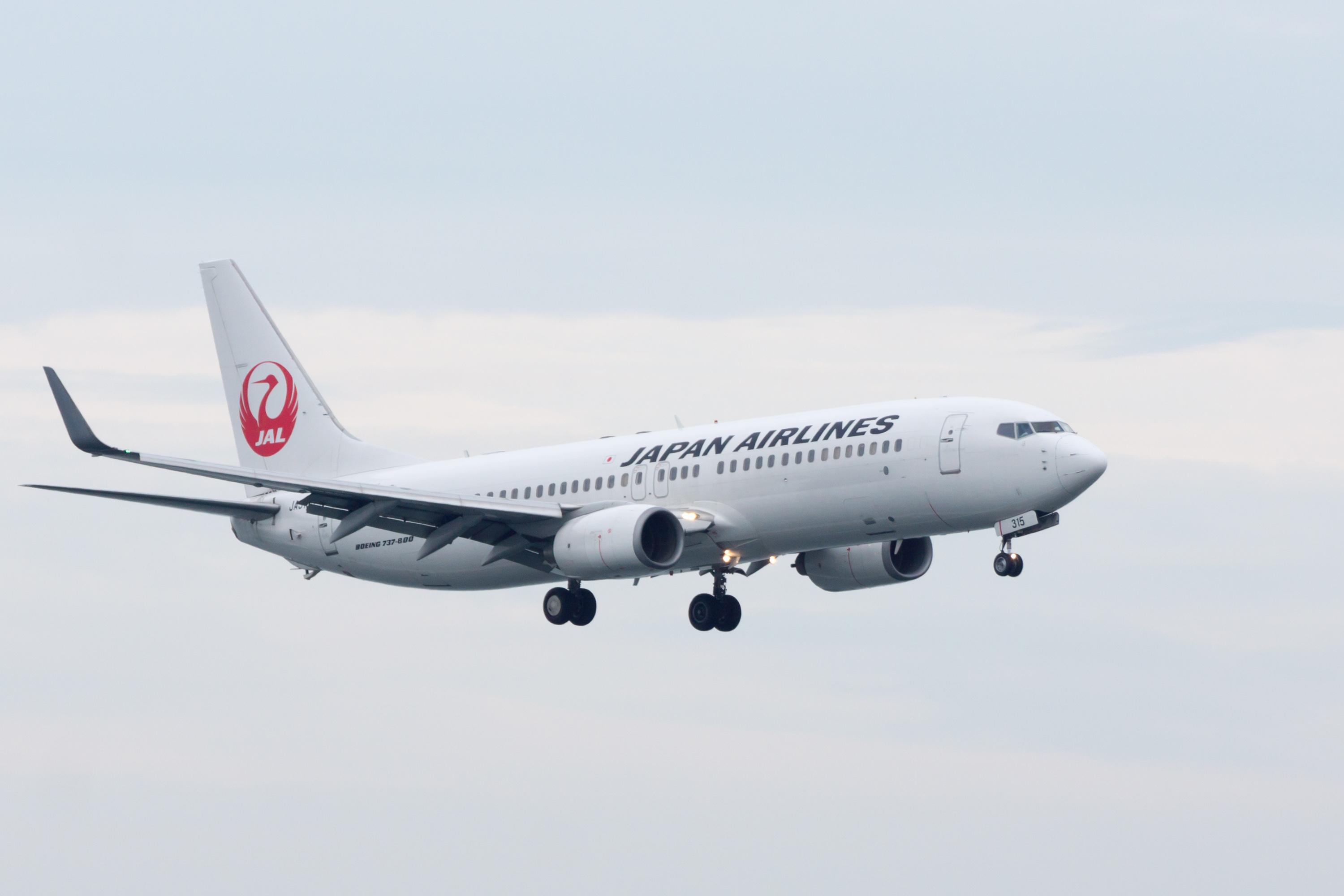 Japan Airlines / 日本航空 Boeing 737-846 JA315J JL894, Arrived from Shanghai Osaka Kansai Int'l Airport